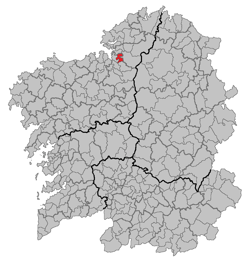 Mapa coa localización do concello de Vilarmaior.